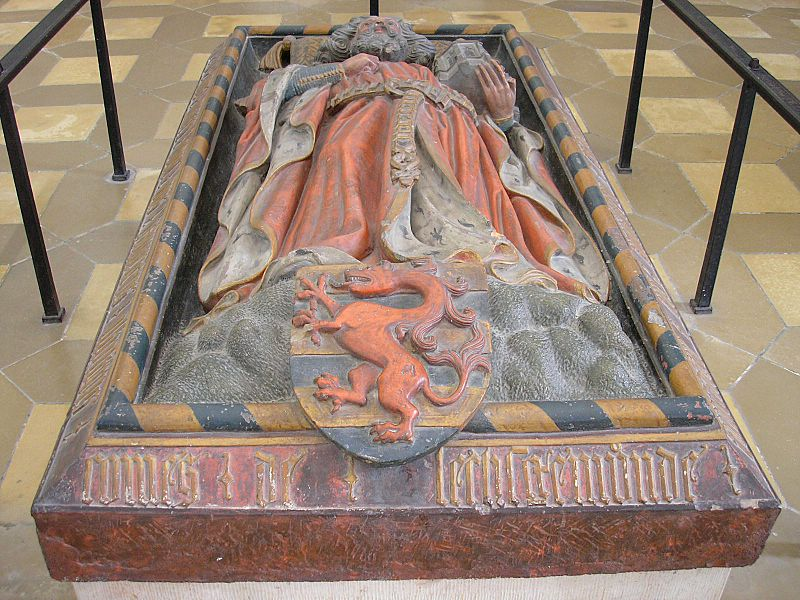 Klosterkirche Kaisheim (Landkreis Donau-Ries, Bayern). Grab des Grafen von Lechsgmünd im Hauptschiff. Eigene Aufnahme, Juli 2006 / Abbey church Kaisheim near Donauwoerth, Bavaria, Germany. Tomb of the Count of Lechsgmuend. Own photo, July 2006